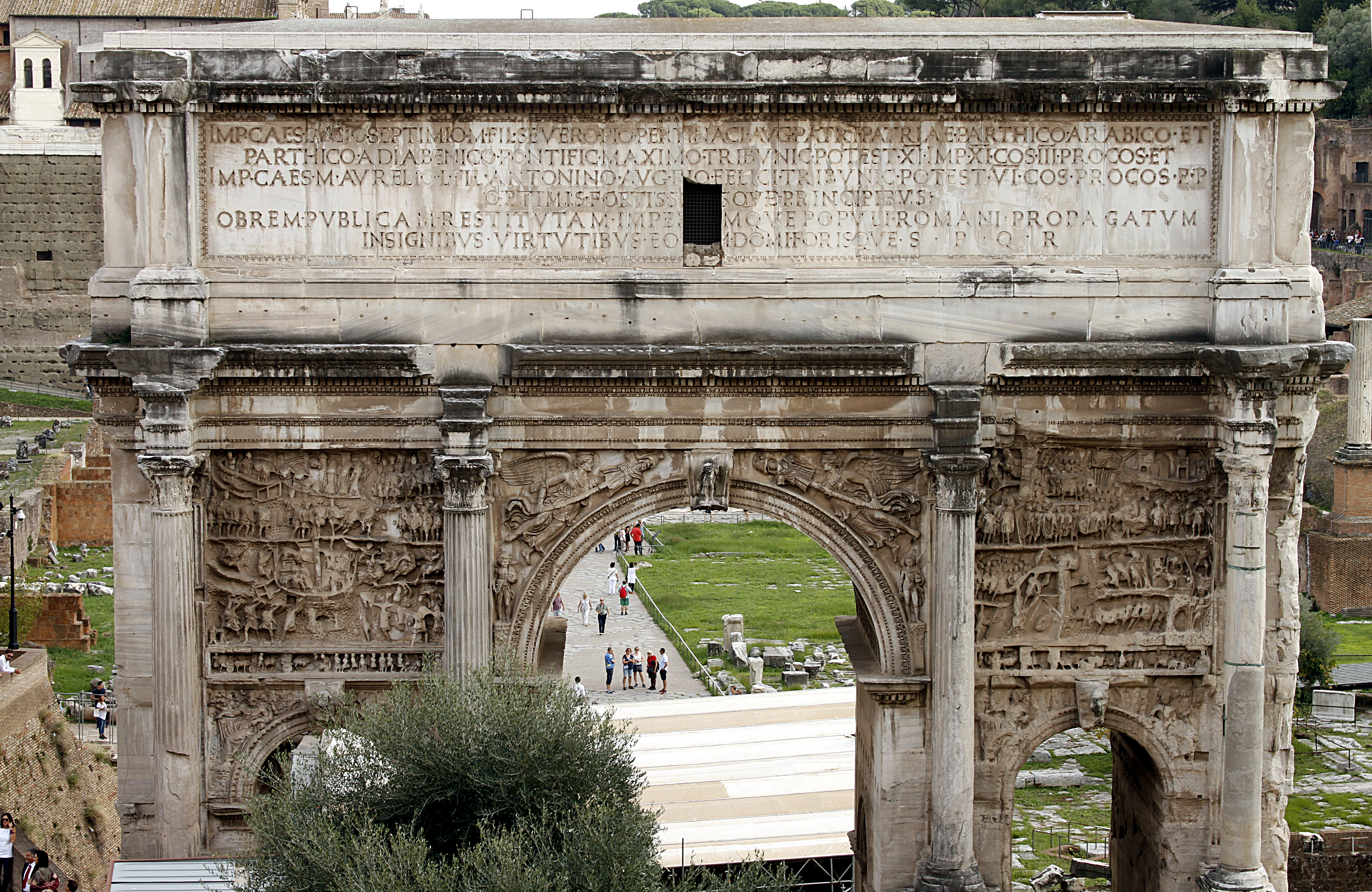 Arch of Septimius Severus - Rome